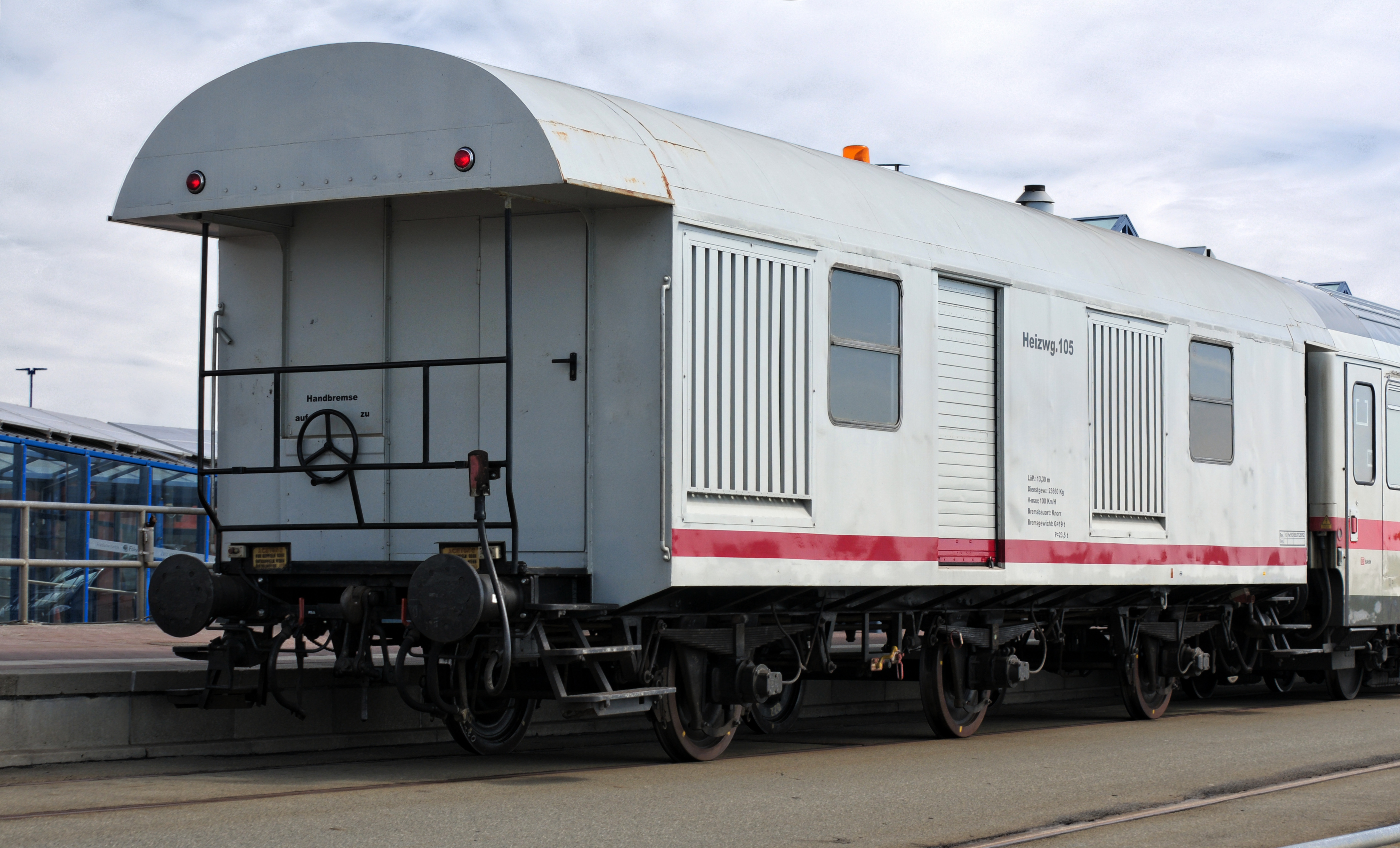 Heizwagen in Dagebüll